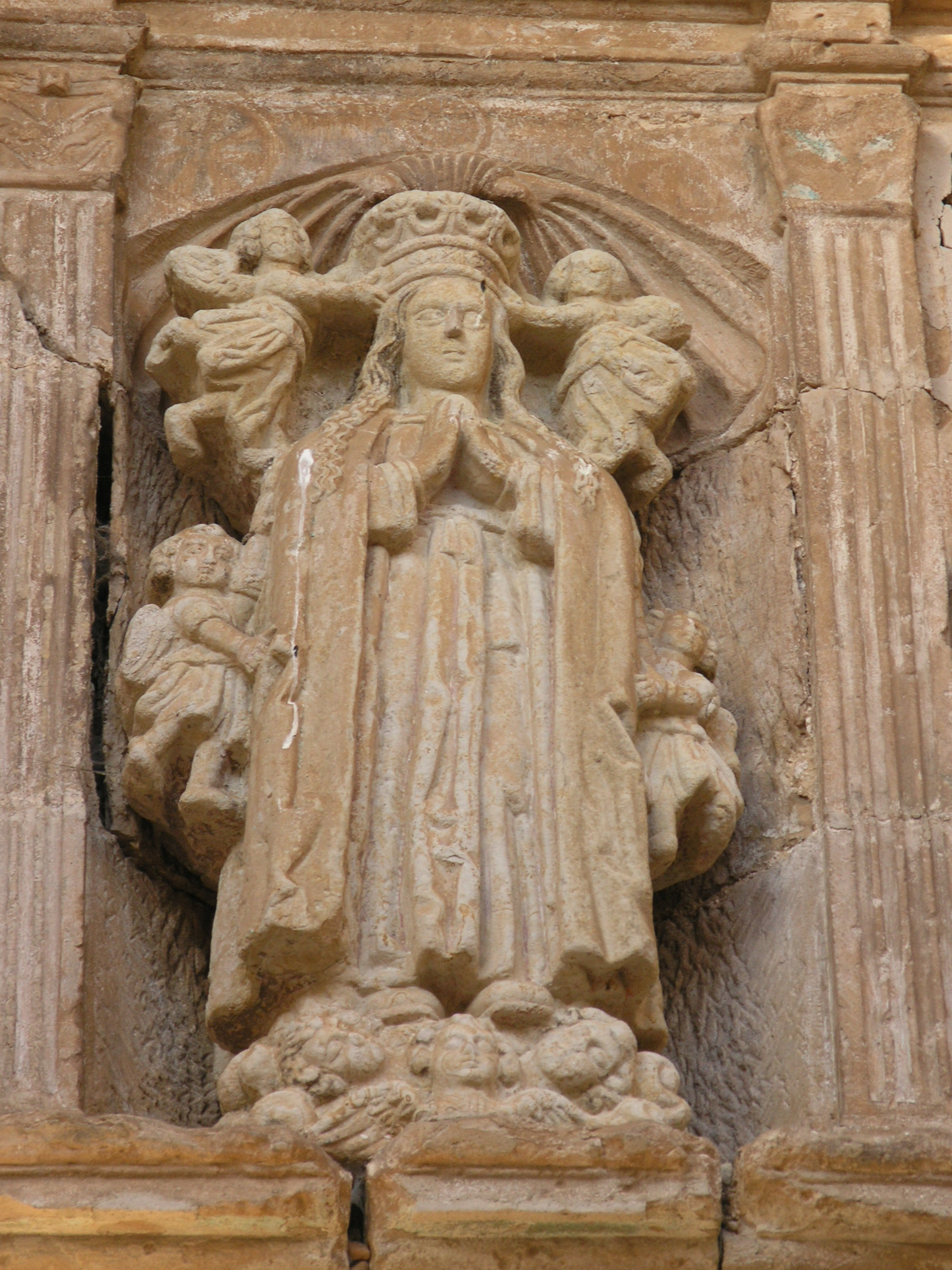 Imagen en piedra de la Virgen de la Asunción. Con influencias del maestro Gregorio Fernández. En la portalada de ingreso a la Iglesia de Nuestra Señora de la Asunción en Novales (Alfoz de Lloredo), Cantabria, España. Mediados del siglo XVI. Estilo renacentista. Bien inventariado, incluido en el Inventario General del Patrimonio Cultural de Cantabria en 2001.